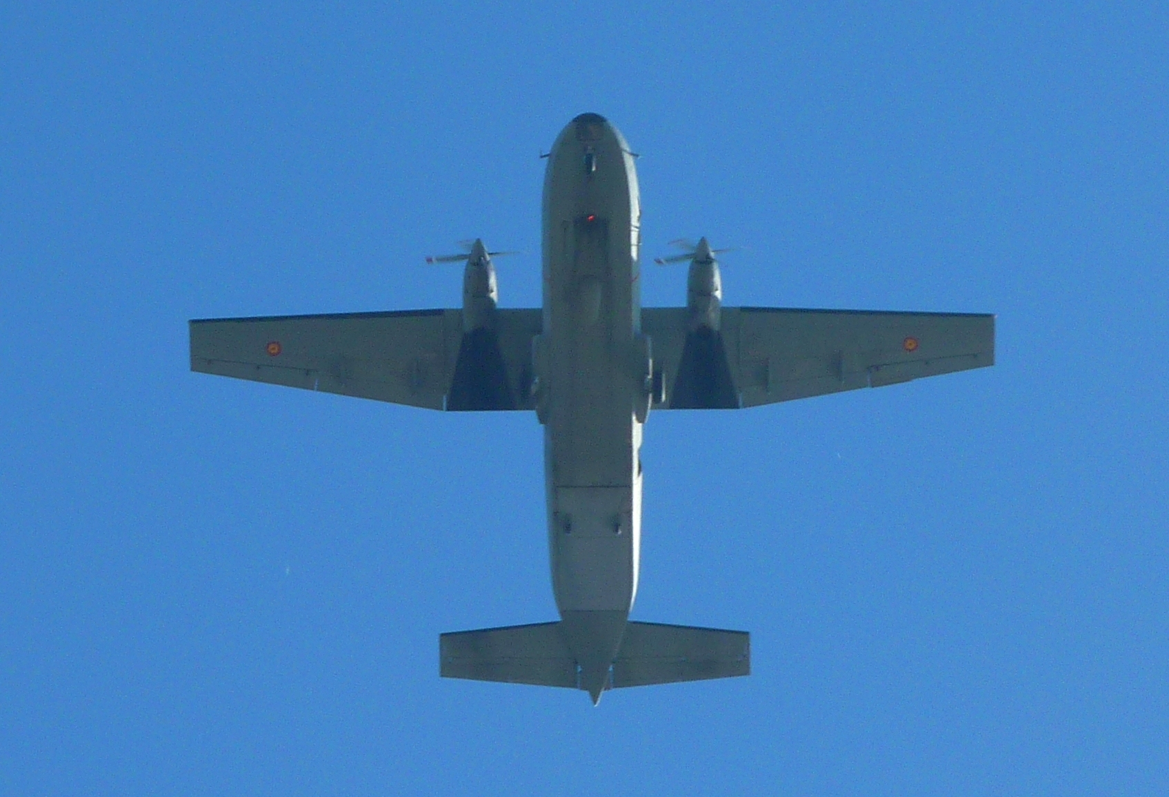 C-212-100 del Ejército del Aire Español.